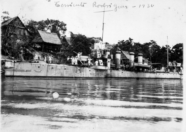 Destructor peruano Teniente Rodrigez en el río Amazonas, Iquitos, 1934. Fue enviado allí junto a otros buques de la Escuadra, a fin de reforzar la presencia naval peruana durante el Conflicto con Colombia por Leticia.